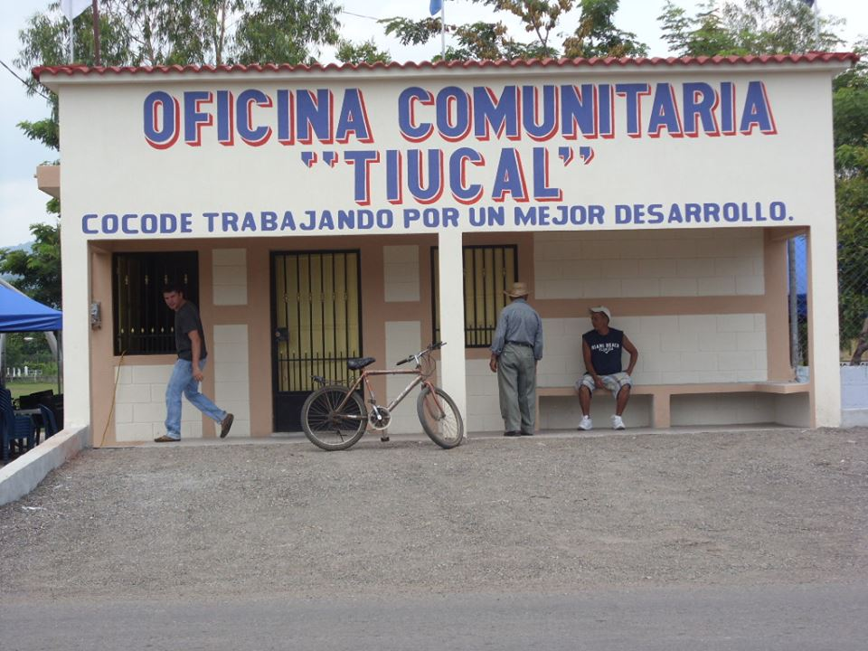 Oficina de Atención Comunitaria